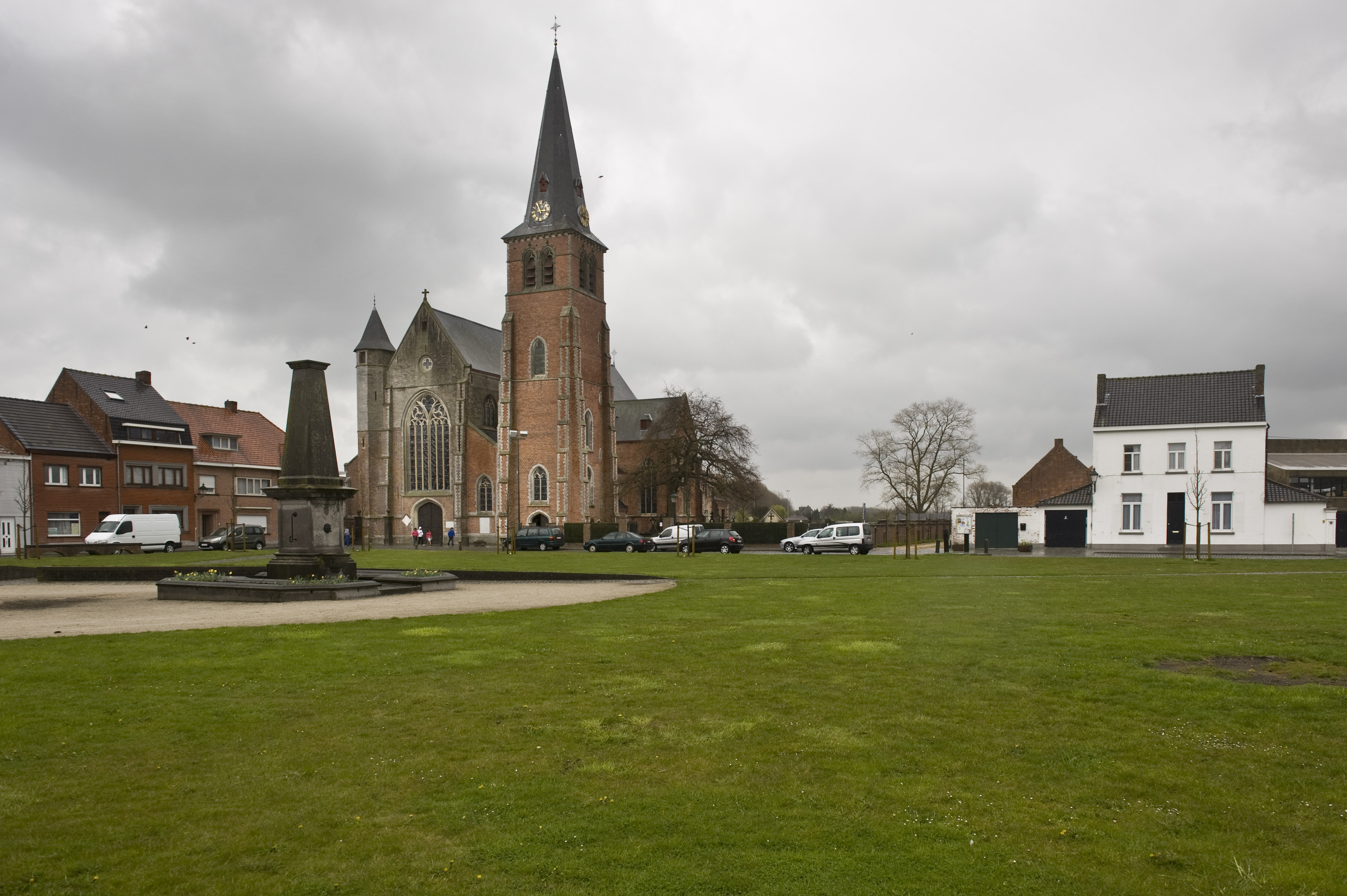 Watervliet, Het Stee met de Onze-Lieve-Vrouw-Hemelvaartkerk.